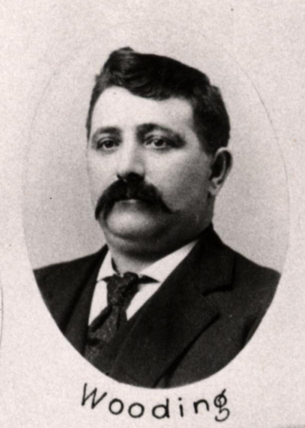 SEn J Wooding